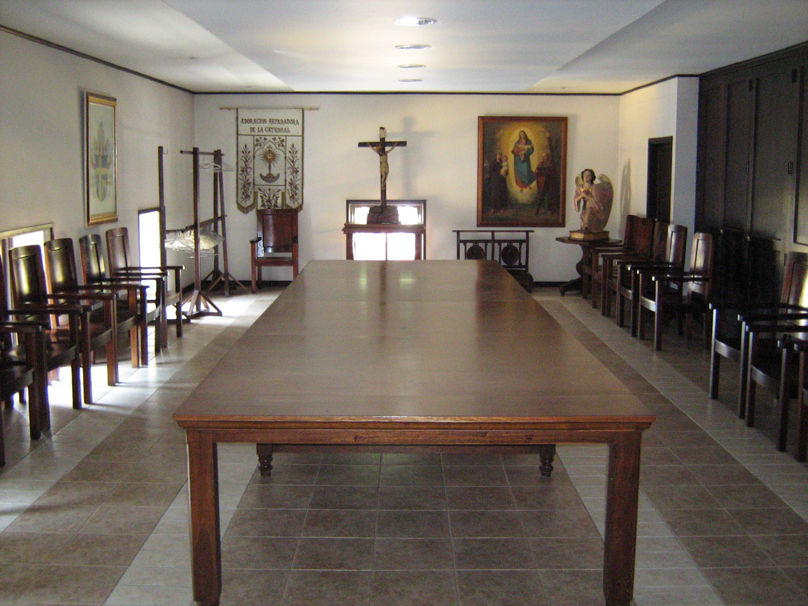 Sala capitular de la Catedral Metropolitana de Medellín, Colombia